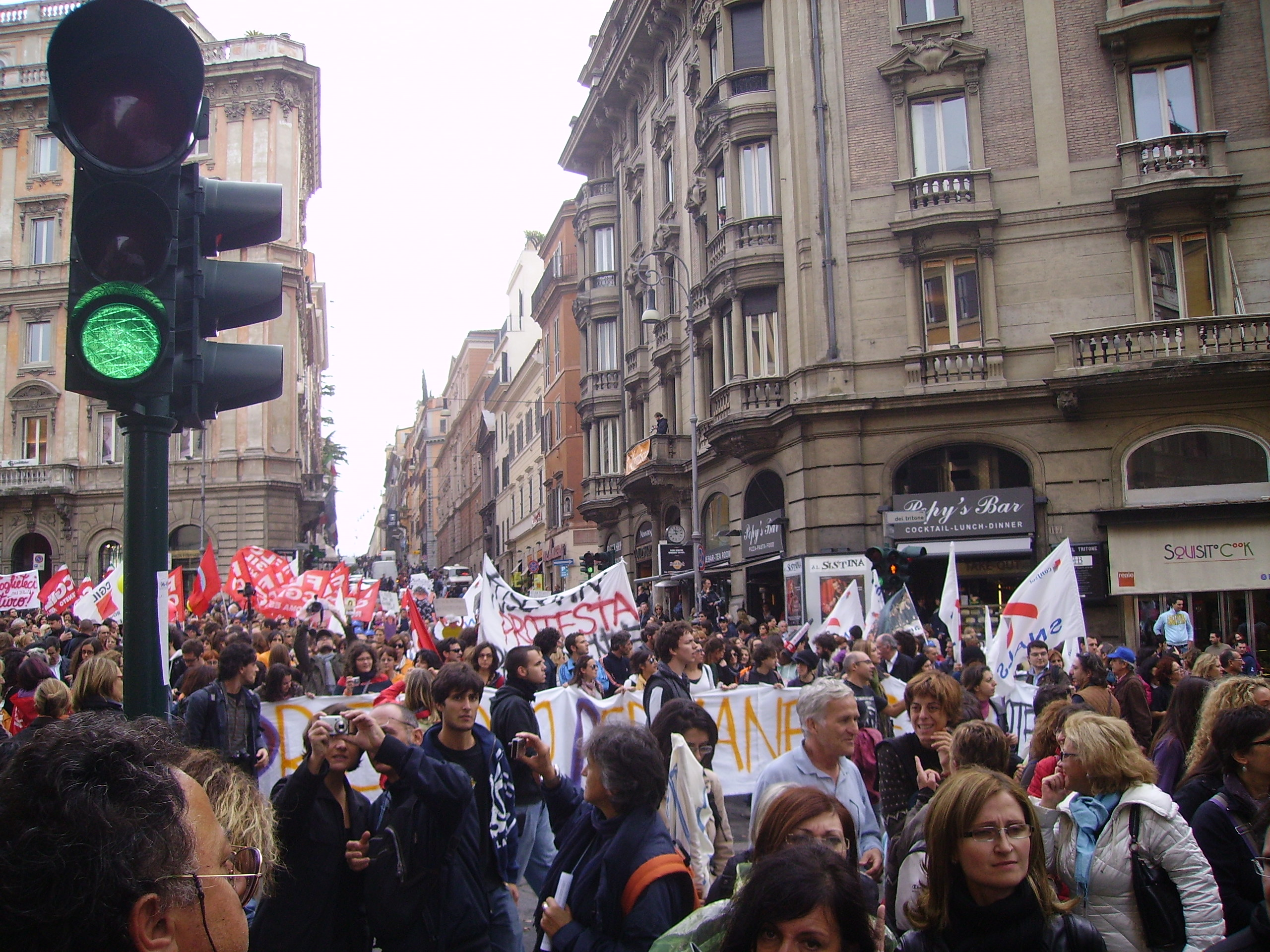 Via Sistina durante lo sciopero generale della scuola contro la politica scolastica del governo (30 ottobre 2008)